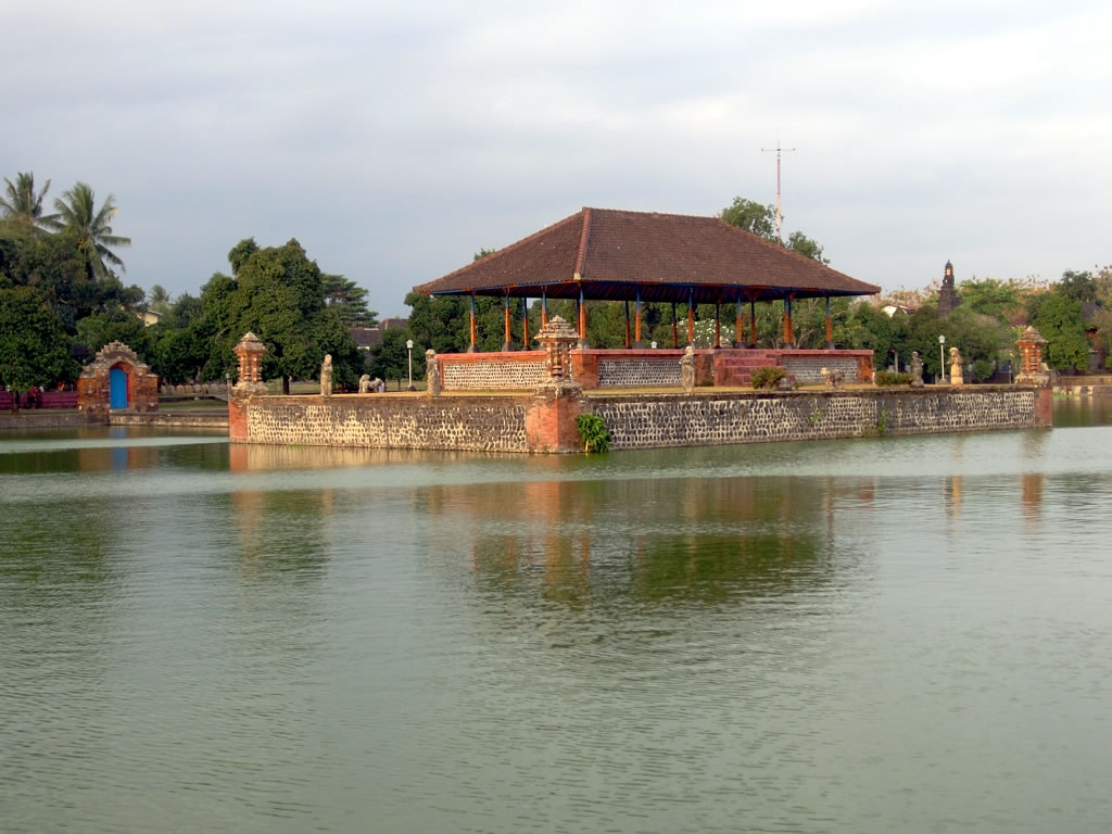 Mayura Water Palace, Cakranegara, Lombok